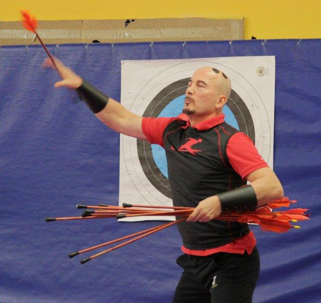 Joe Alexander, Guinness World Records Halter im Pfeile fangen. Rekord: 43 Pfeile in 2 Minuten, am 11.11.2010